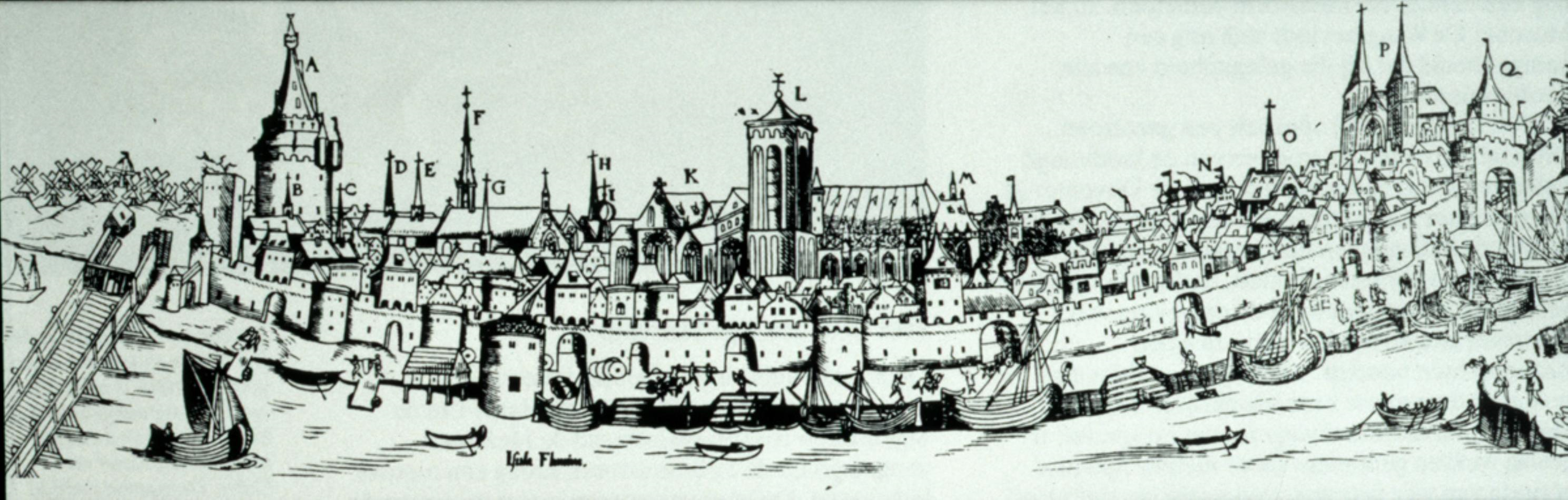 De oudst bekende afbeelding van Deventer, omstreeks 1550. Anonieme houtsnede. Museum De Waag, Deventer.